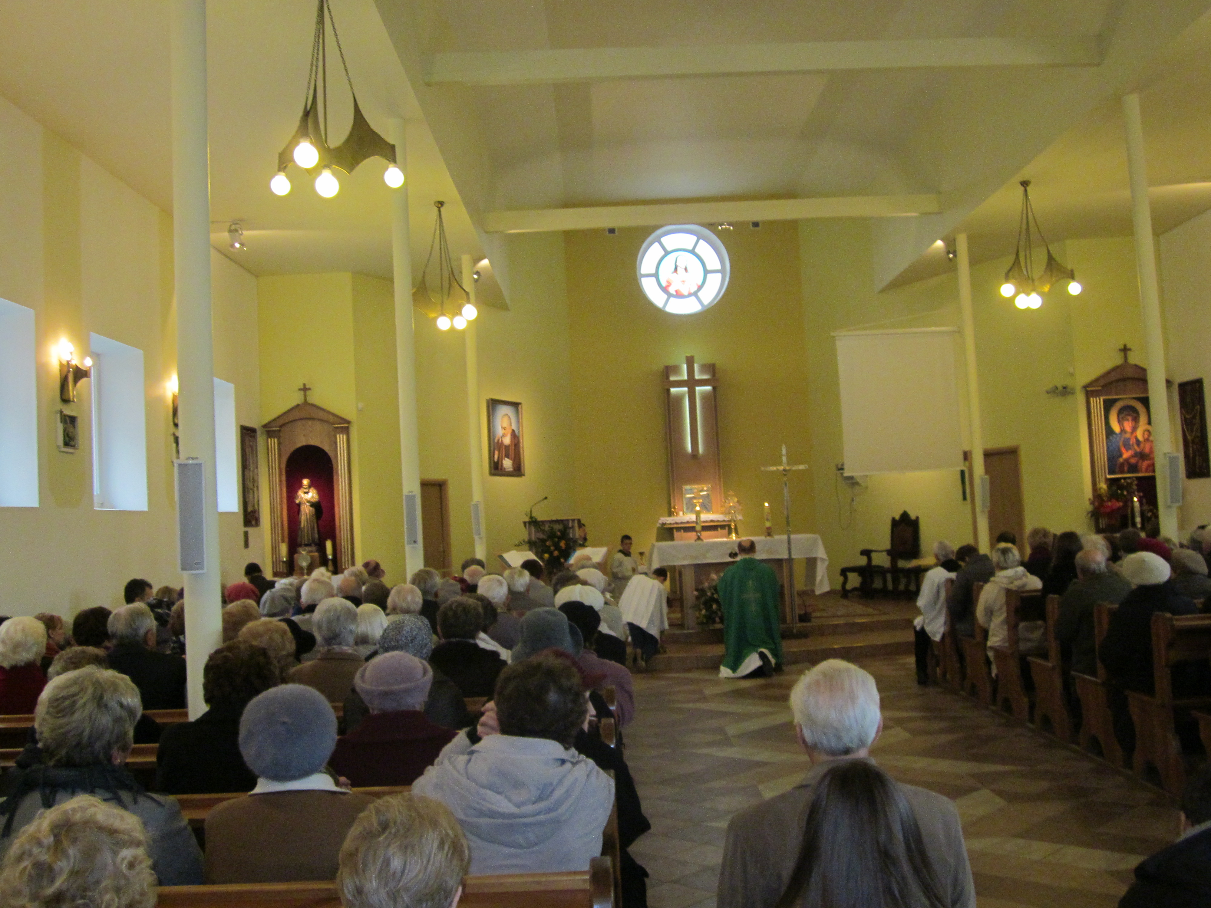 ul. Mickiewicza. Wnętrze kaplicy – widok ku prezbiterium. Wystawienie Najświętszego Sakramentu – na ołtarzu głównym znajduje się monstrancja. W czasie adoracji został odmówiony różaniec oraz Litania loretańska do Najświętszej Maryi Panny.